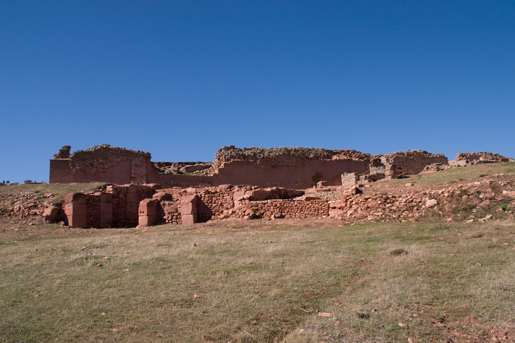 Foro Flavio